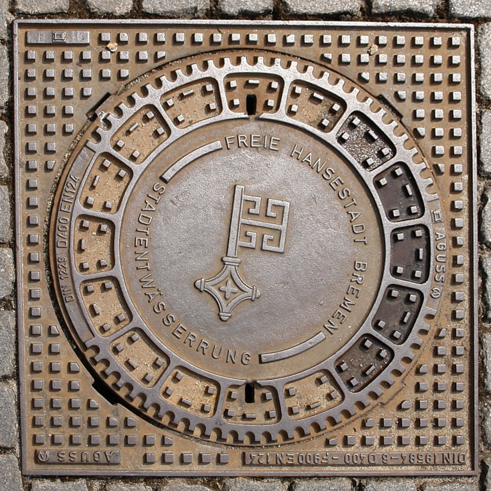 Schachtdeckel auf dem Marktplatz in Bremen